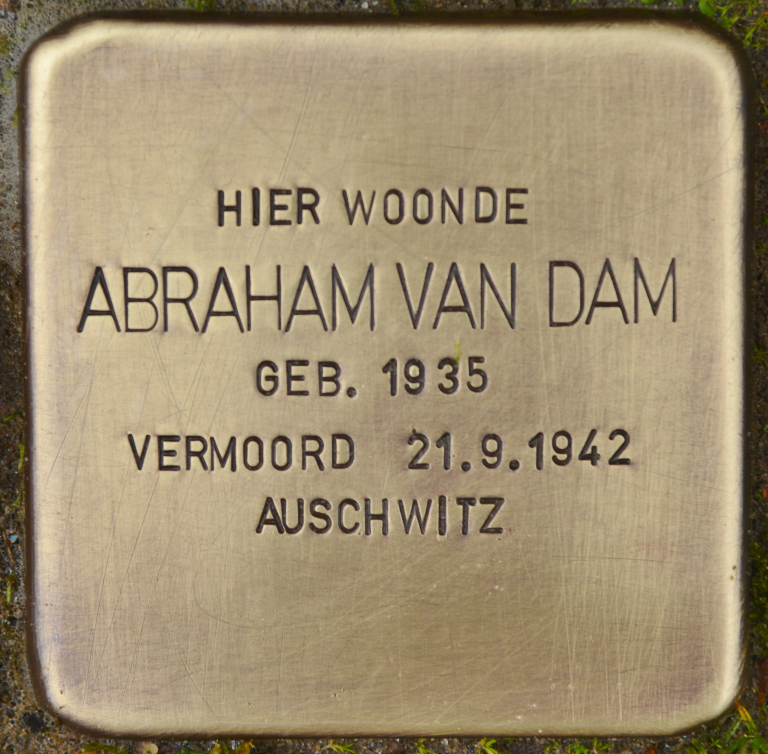 Stolperstein für Abraham van Dam